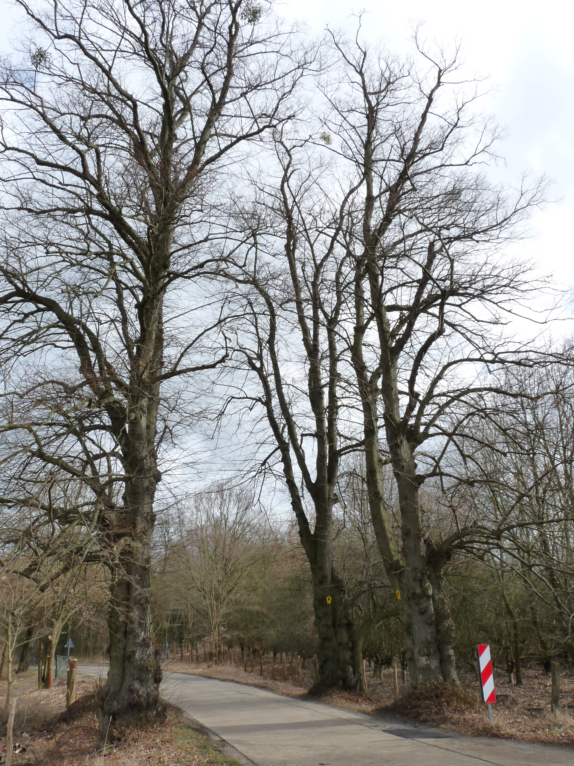 4 Linden (Tilia spec.). Kronendurchmesser zusammen 20 m, Seltenheit, Eigenart, Landschaftsbild